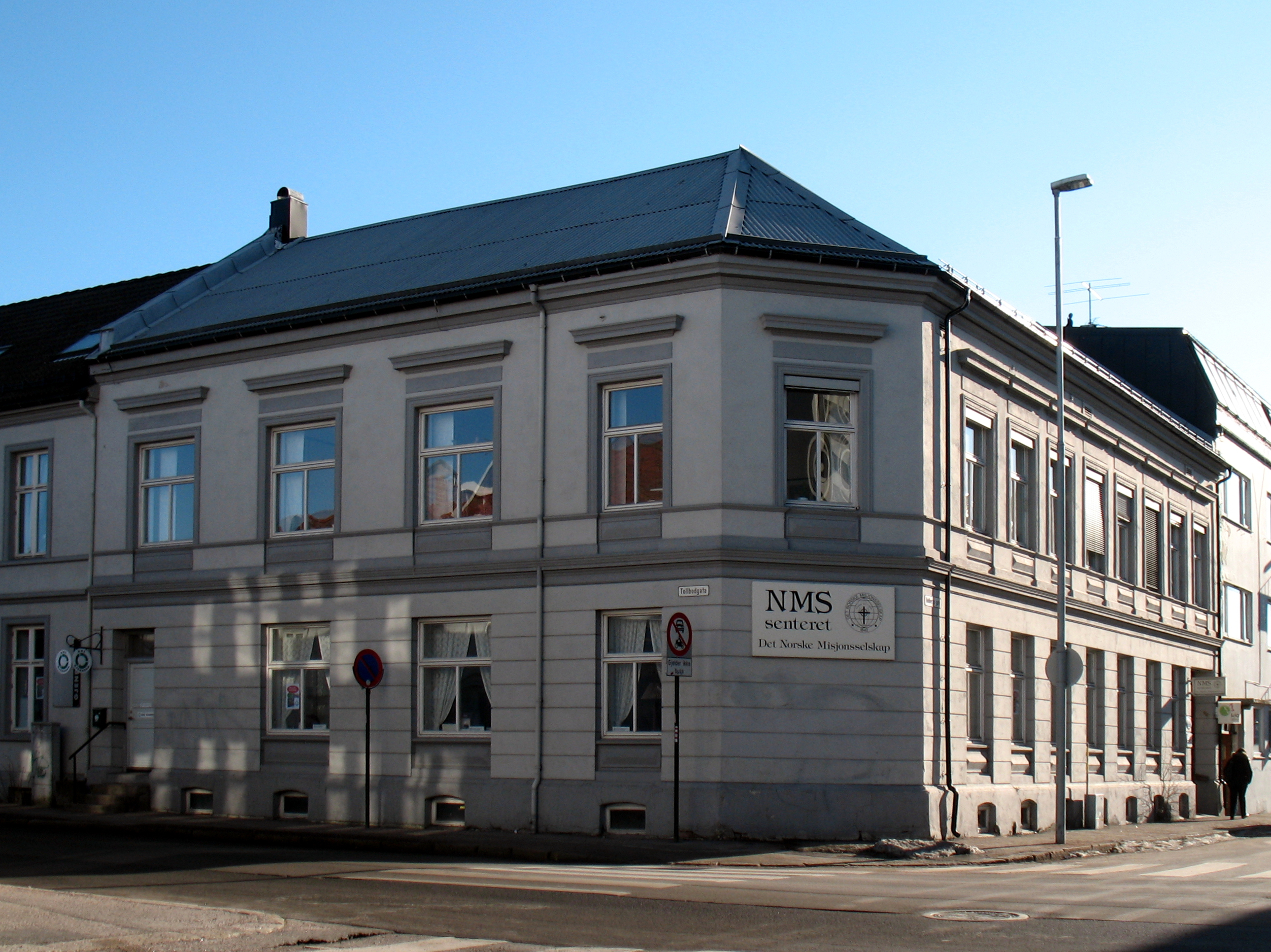 NMS-senterets bygning Tollbodgata 48A på hjørnet Holbergsgate i bydelen Kvadraturen / Eg i Kristiansand.